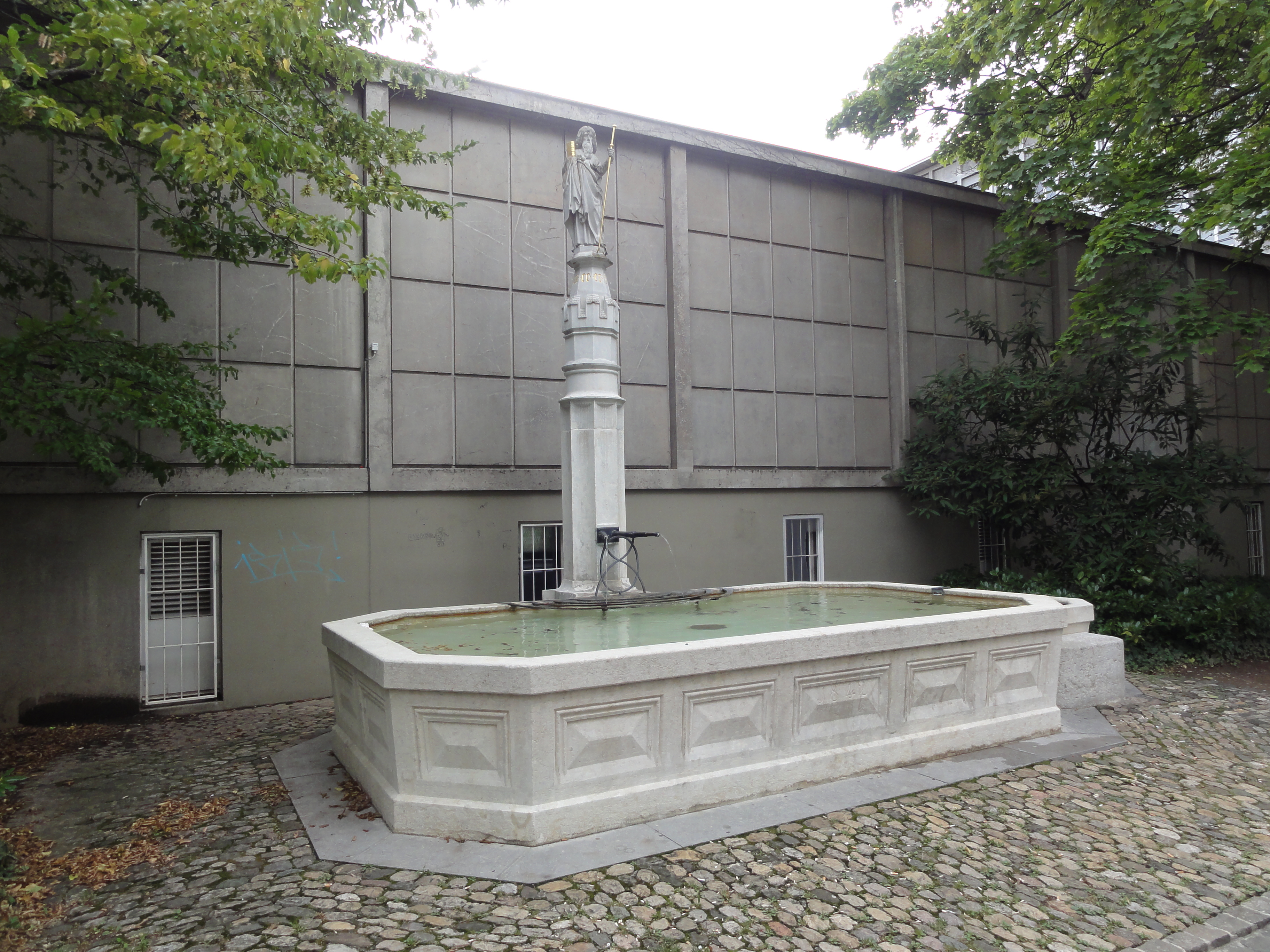 Basel BS — Hermann Kinkelin-Str. 10, Brunnen mit Statue des Hl. Jakob von Hans Tussmann (c. 1420 – c. 1490) (Gymnasium Kirschgarten) Info GPS data may be inaccurate. EXIF data regarding date and time may be inaccurate.